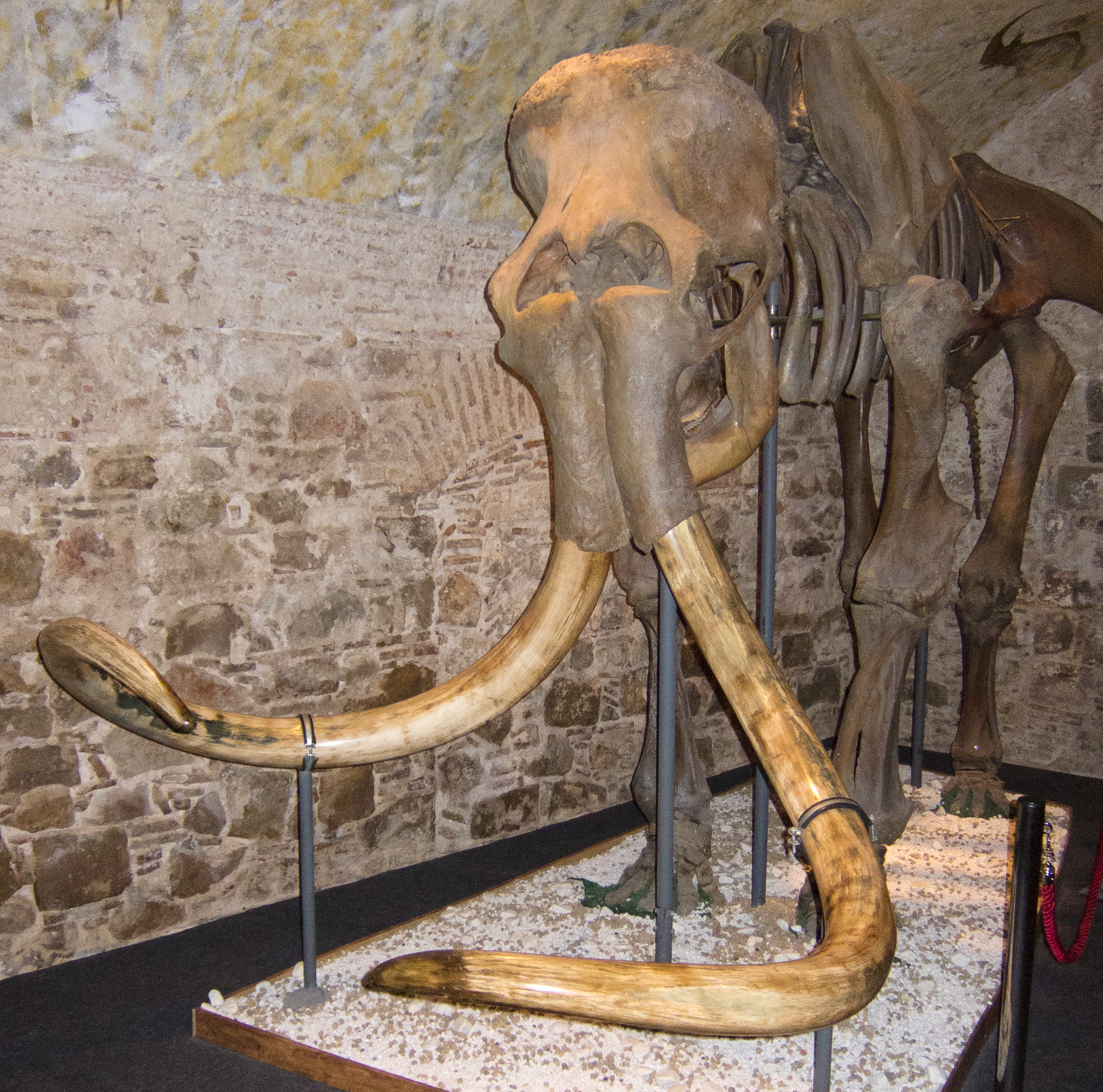 Barcelona 2011